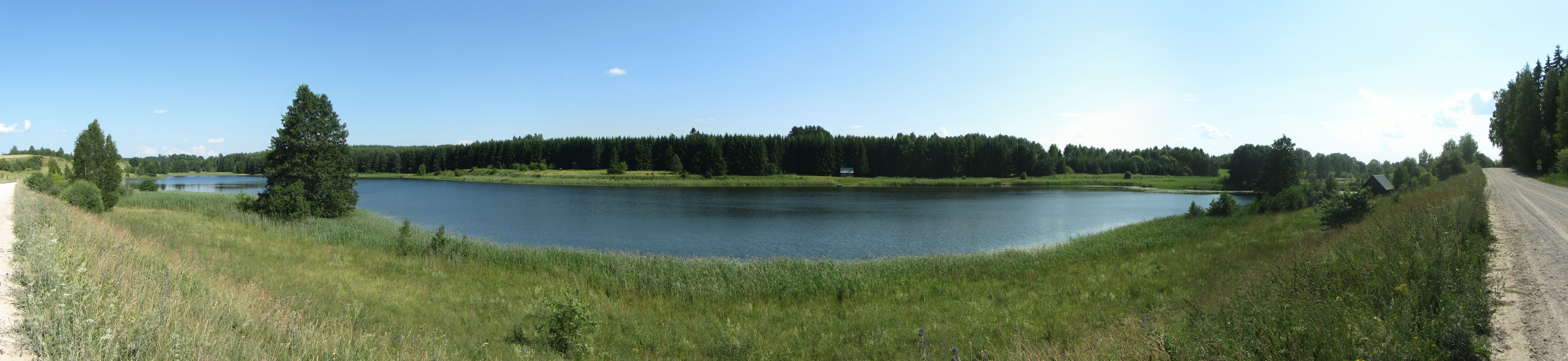 Kurklių sen., Lithuania